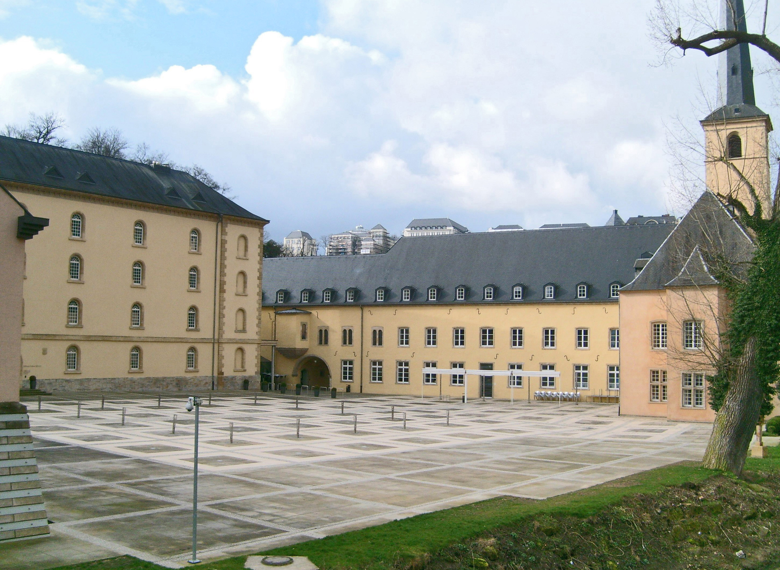 Vue vum Stiirchen aus op de Parvis vun der Abtei Neimënster.